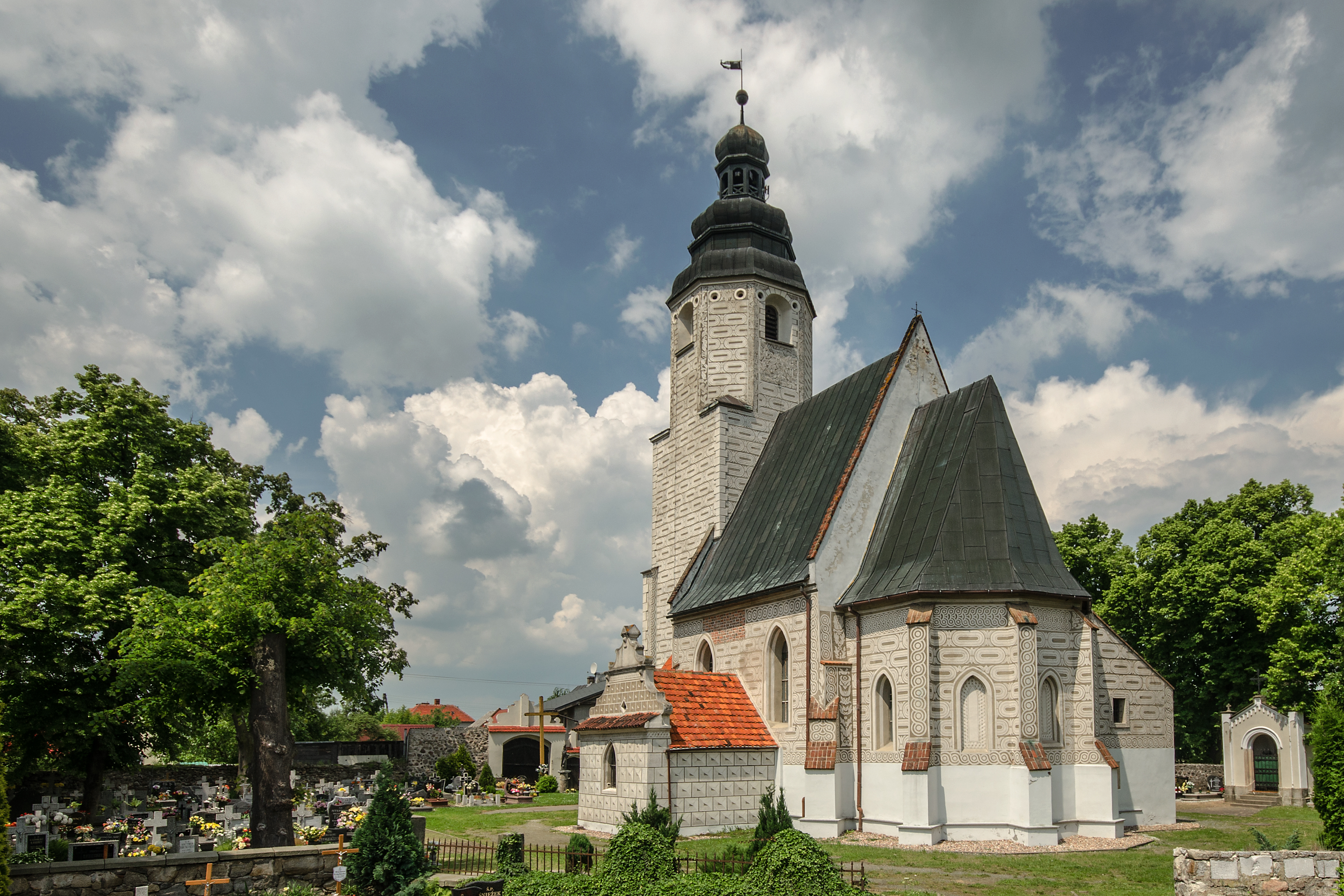 Gałów, kościół fil. p.w. Niepokalanego Poczęcia NMP, 1509, XVIII